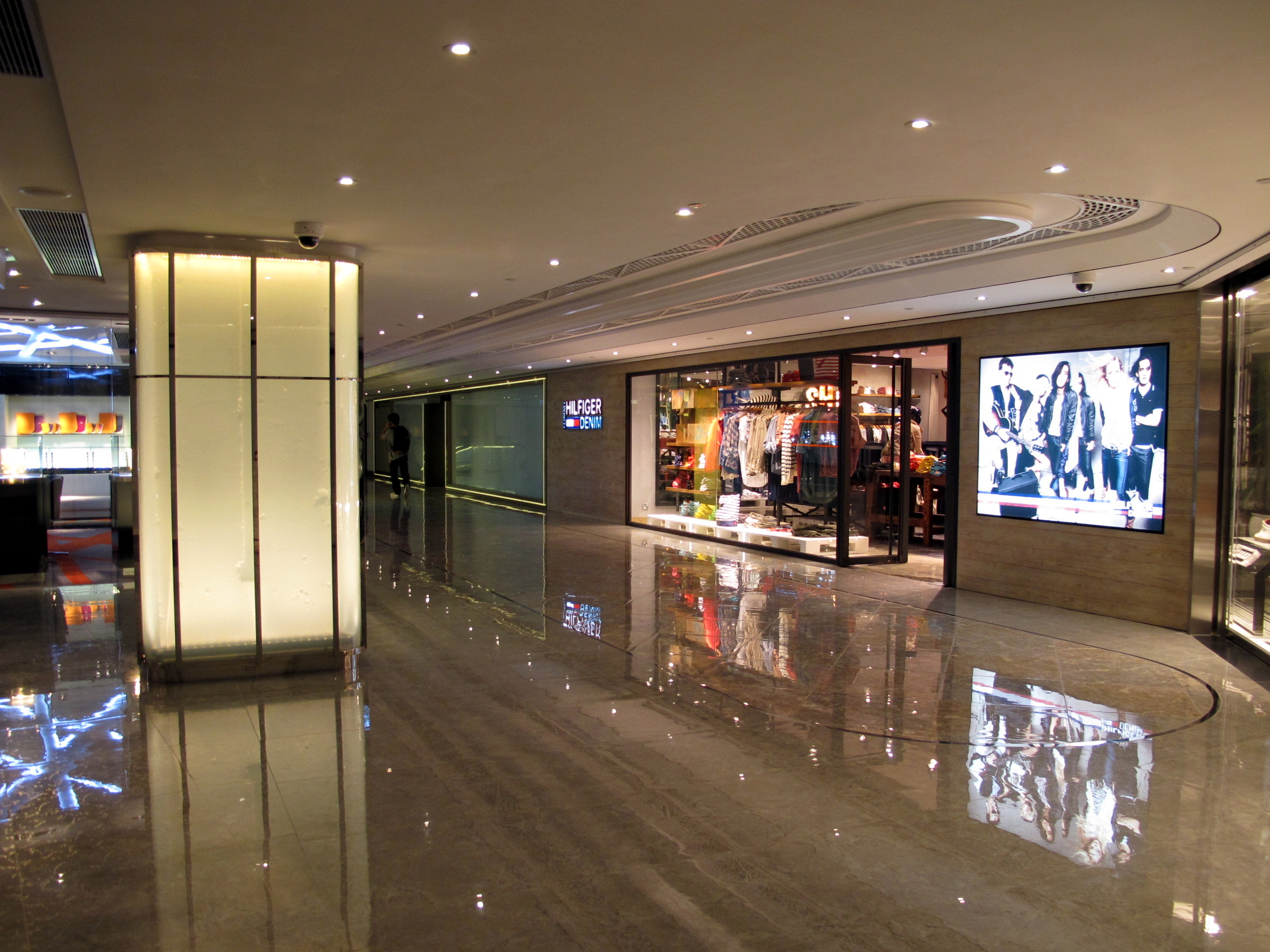 mira mall Level 1